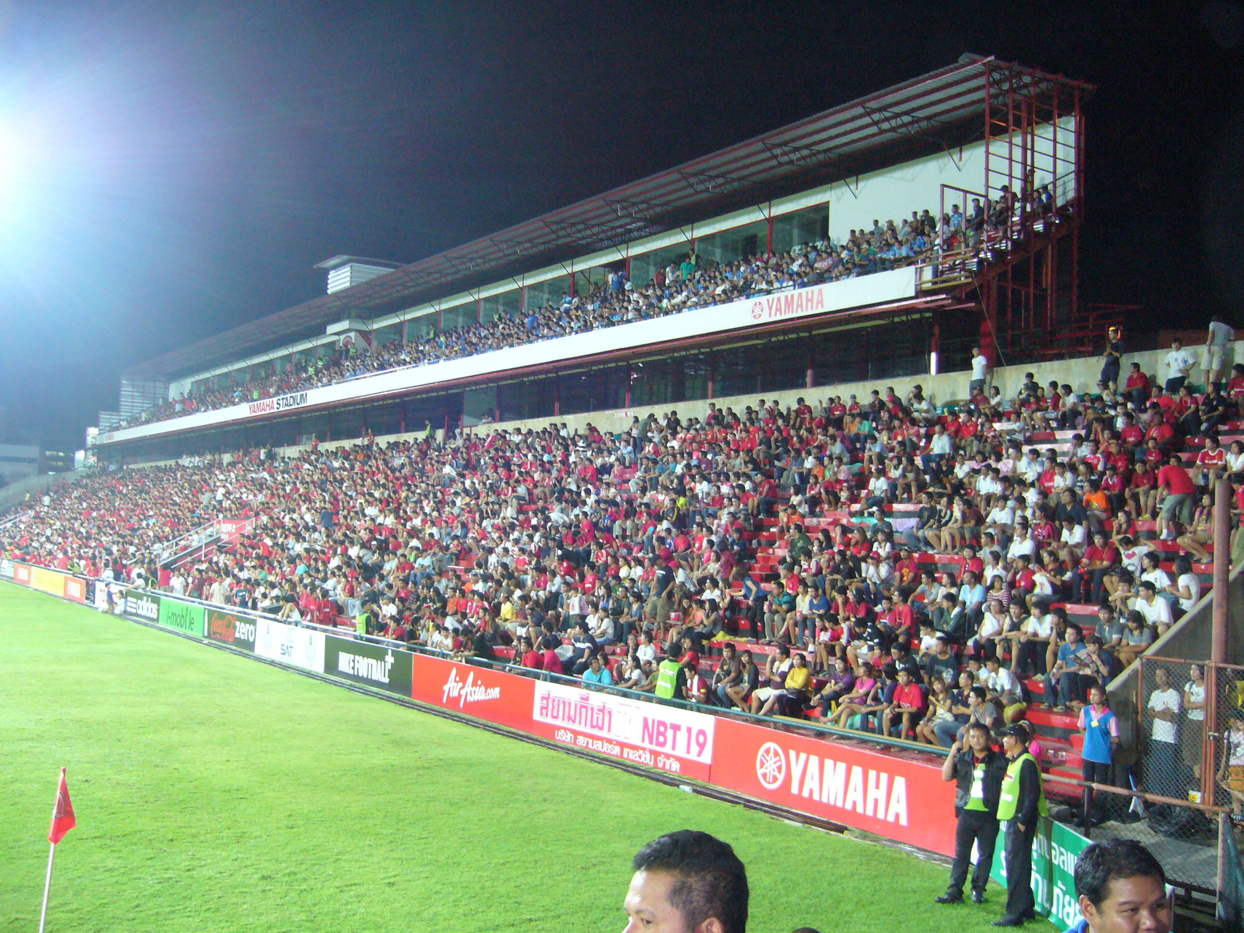 Yamaha Stadium